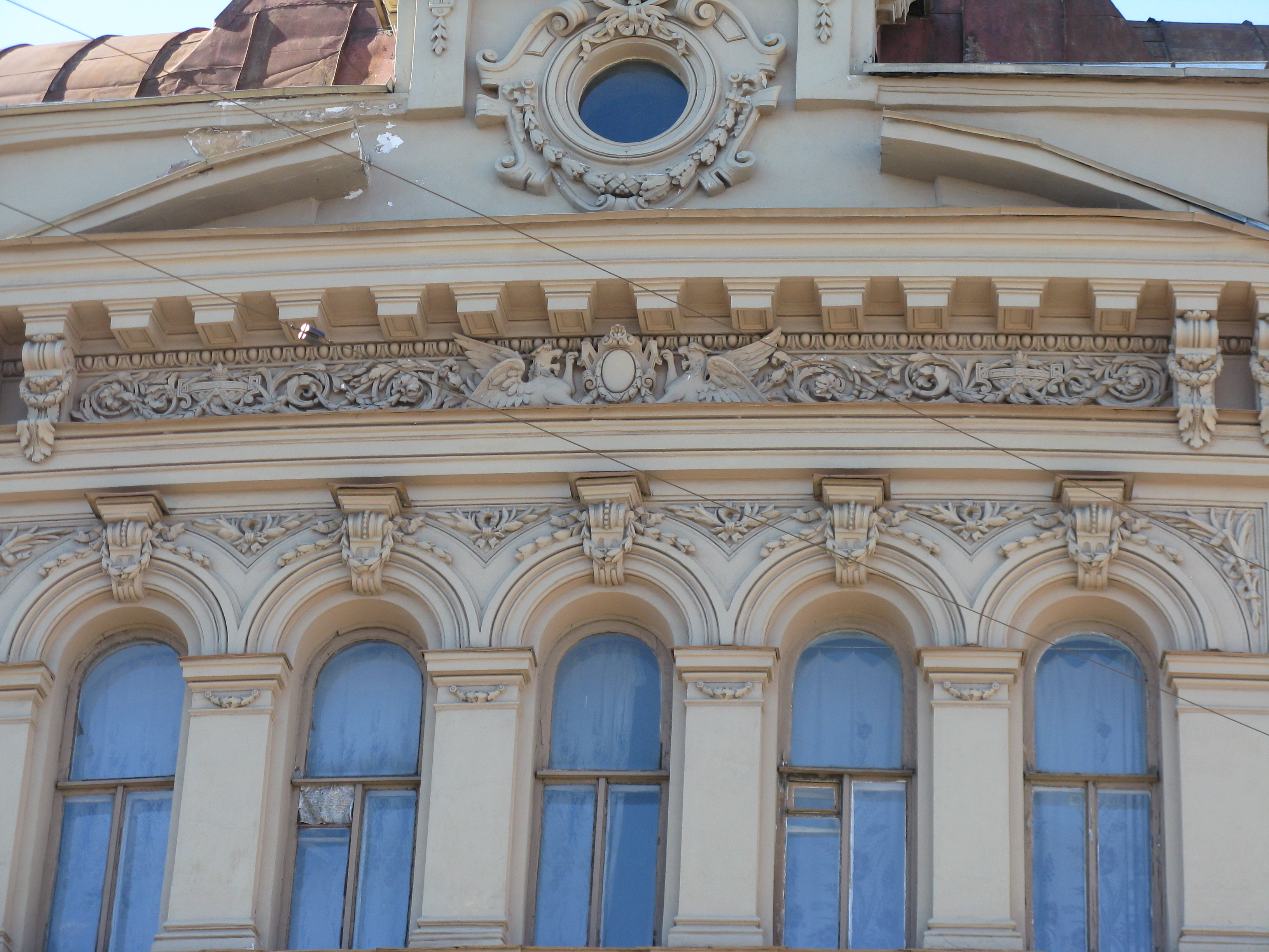 Finsky Lane, 9, St.Petersburg